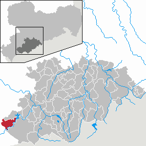 Schönheide im Erzgebirgskreis, Sachsen